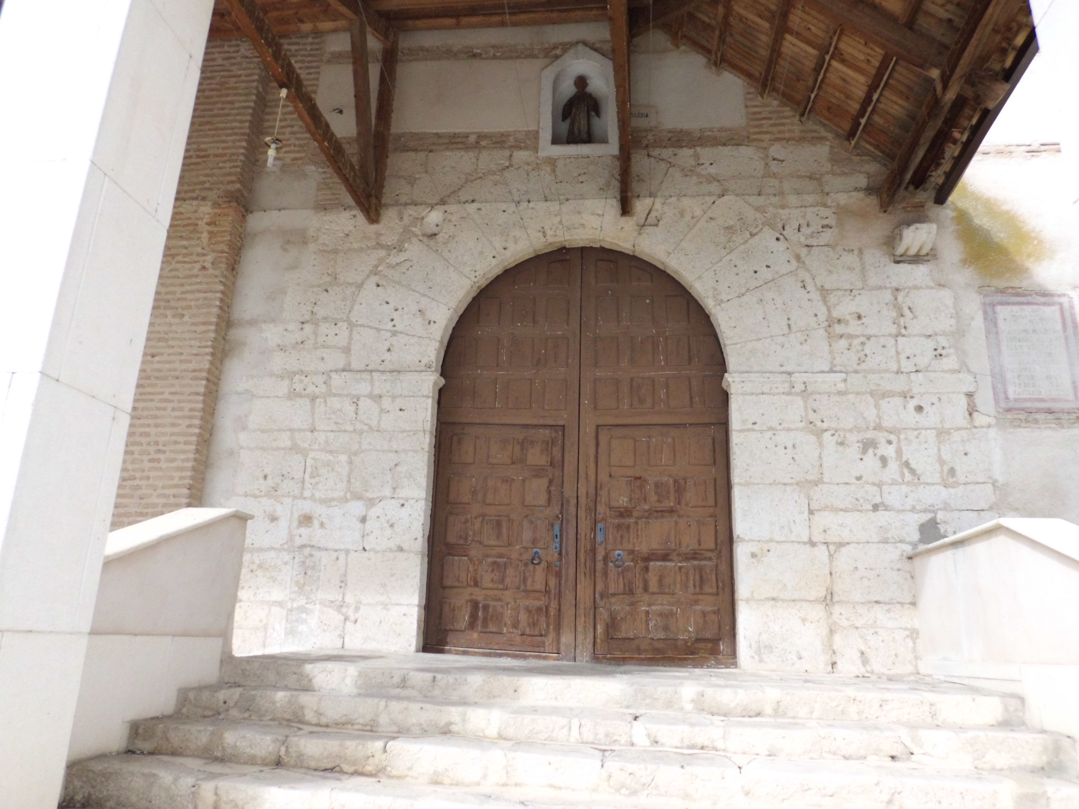 Torrecilla de la Abadesa, provincia de Valladolid (España). Iglesia de San Esteban. Puerta de acceso.